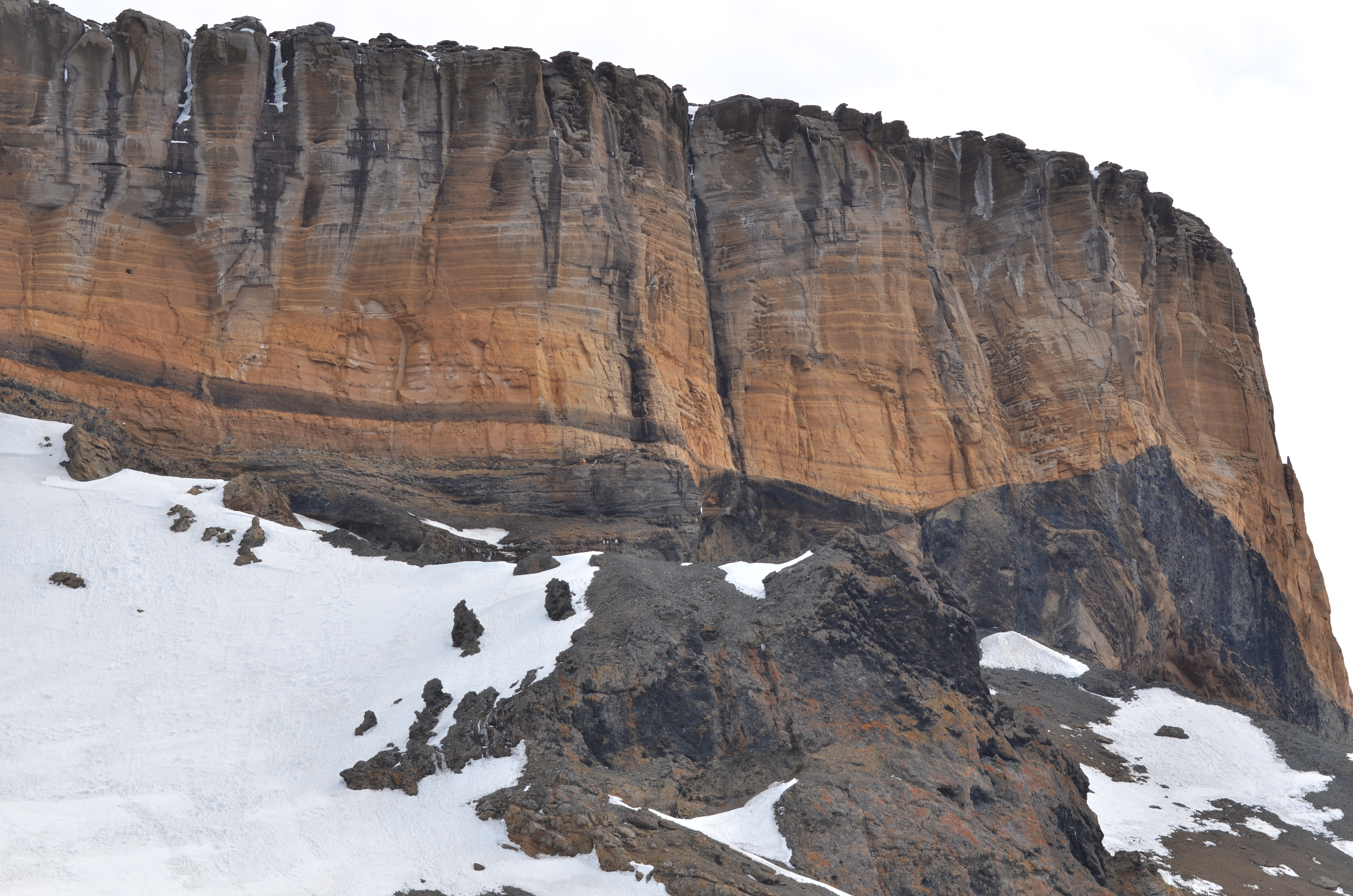 Viaje cultural